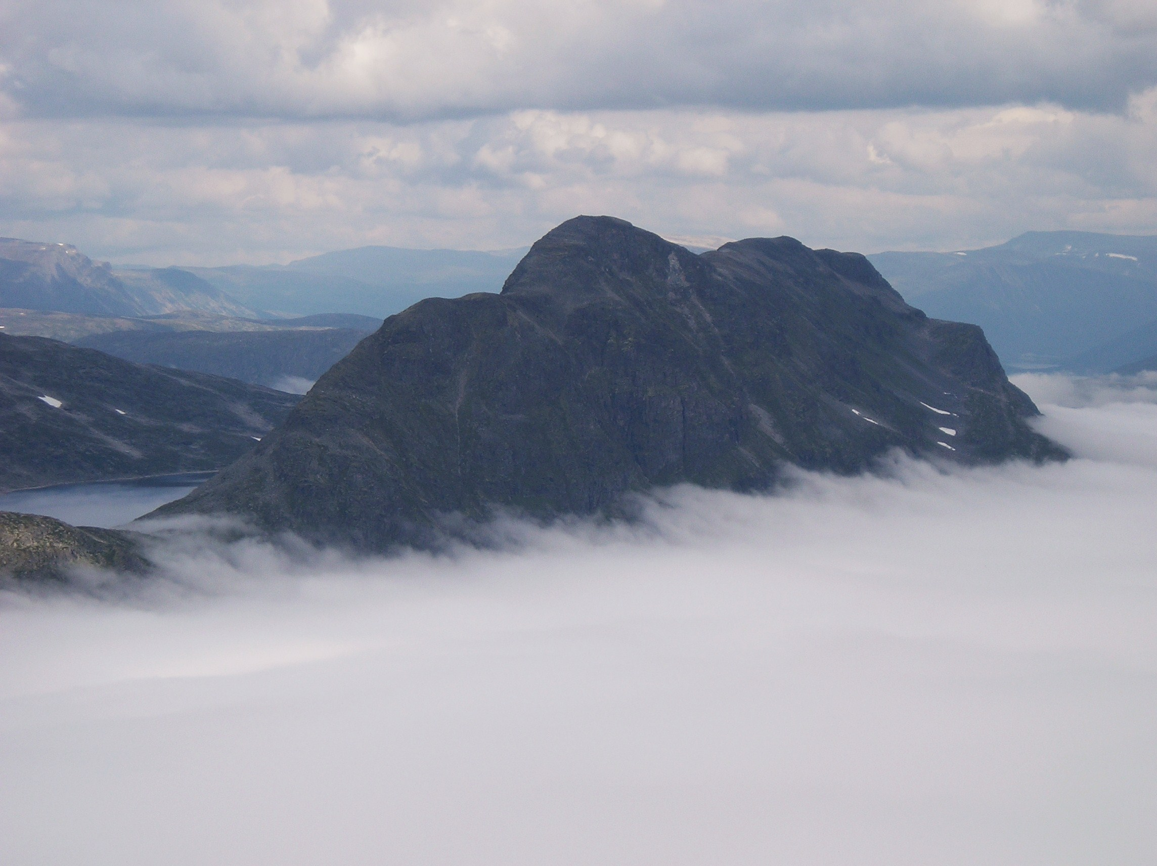 Kringlehøa sett fra Innerdalstårnet